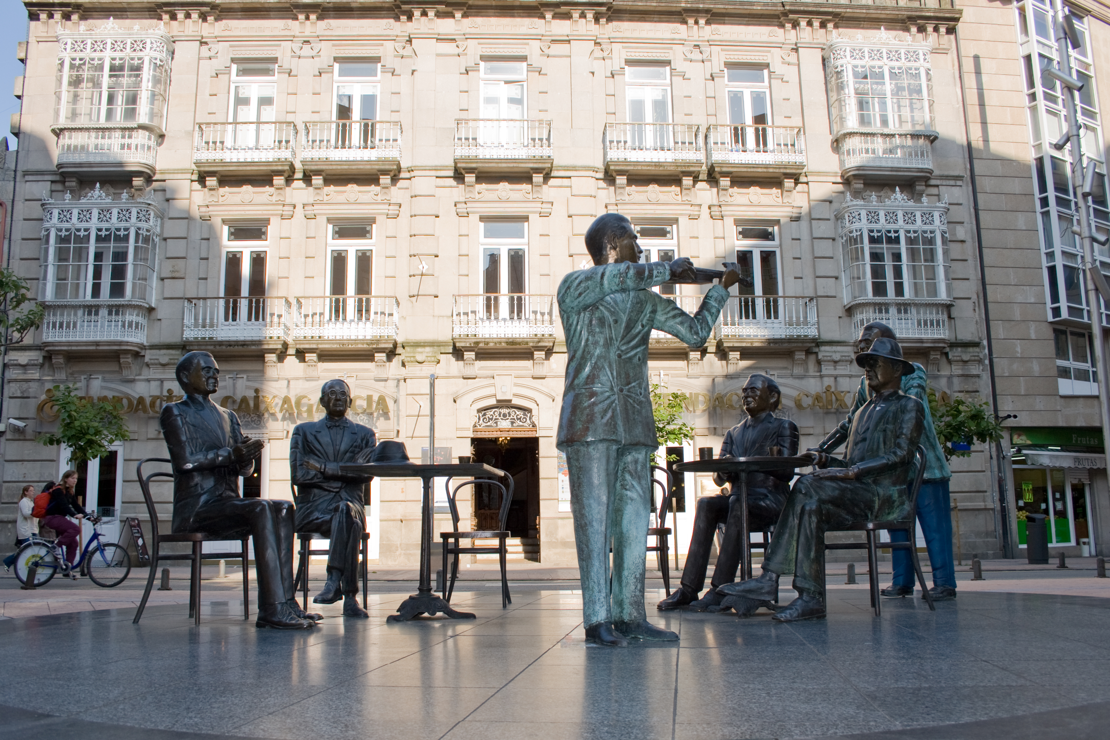 Statues of Alexandre Bóveda (1903-1936), Alfonso Daniel Rodríguez Castelao (1886-1950), Manuel Quiroga (1892-1961 [with violin]), Valentín Paz-Andrade (1899-1987), Carlos Casares (1941-2008) and Ramón Cabanillas (1876-1959), Saint Joseph Square, Pontevedra (Pontevedra, Galicia).